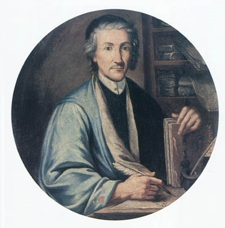 Ritratto di Antonio Vivaldi (dubbio)